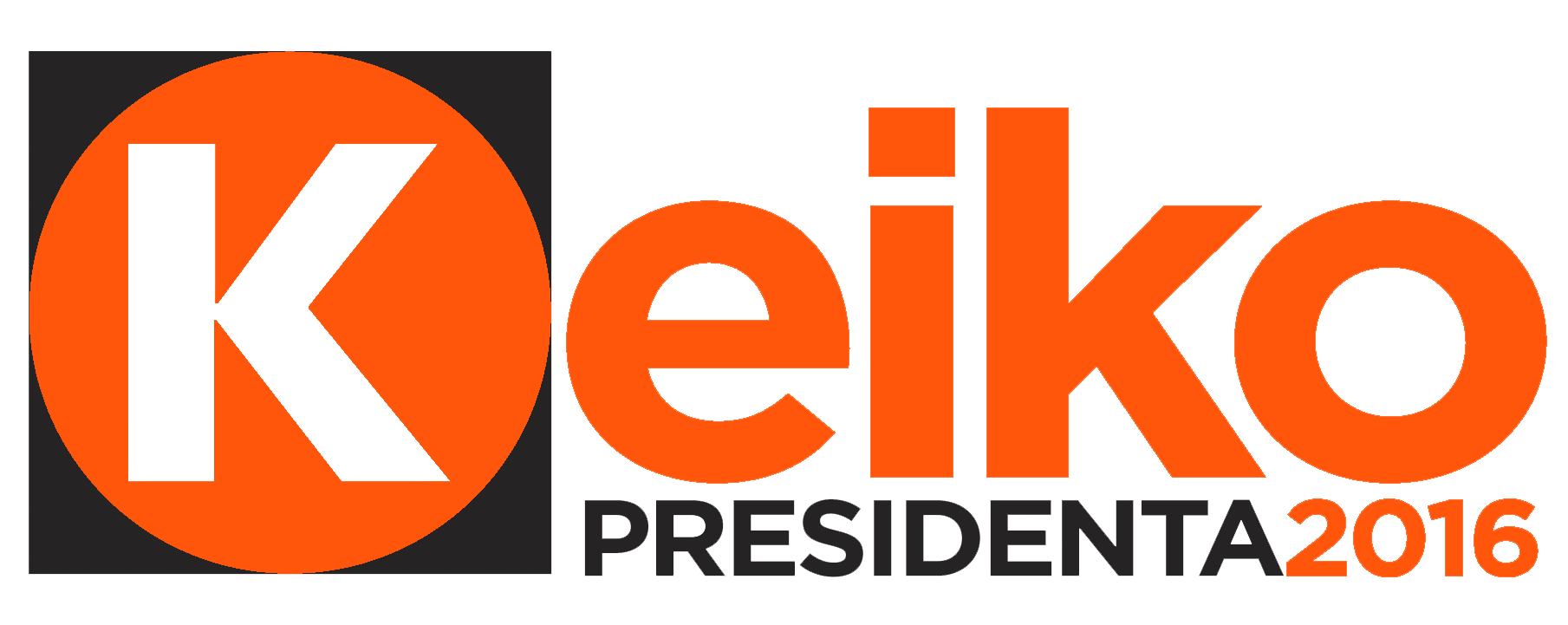 Logo de campaña Keiko Fujimori 2016